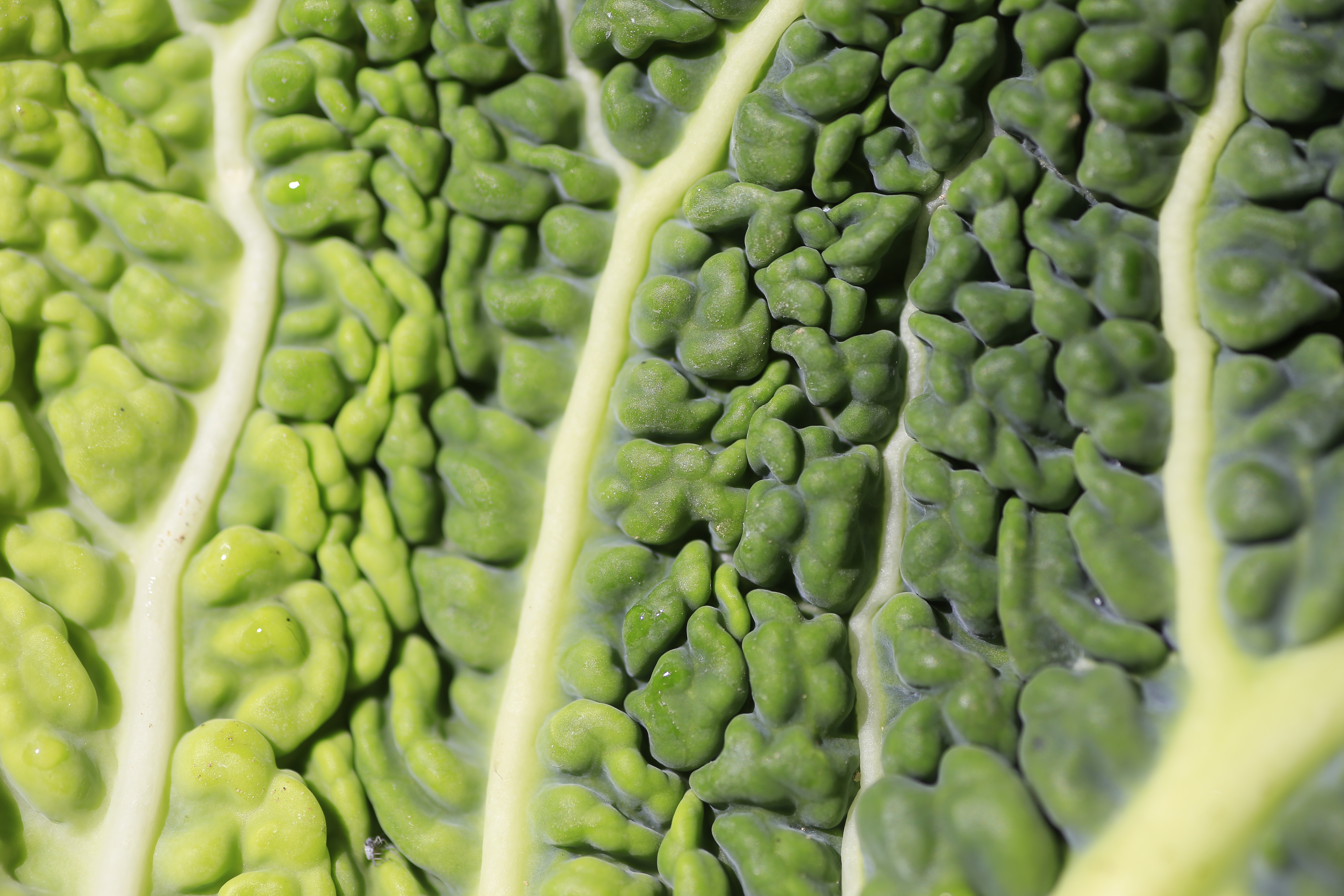 foglia di cavolo verza - fronte